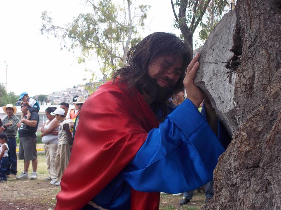 Oracion en el Huerto